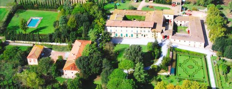 Villa Poggi Banchieri a Castelmartini